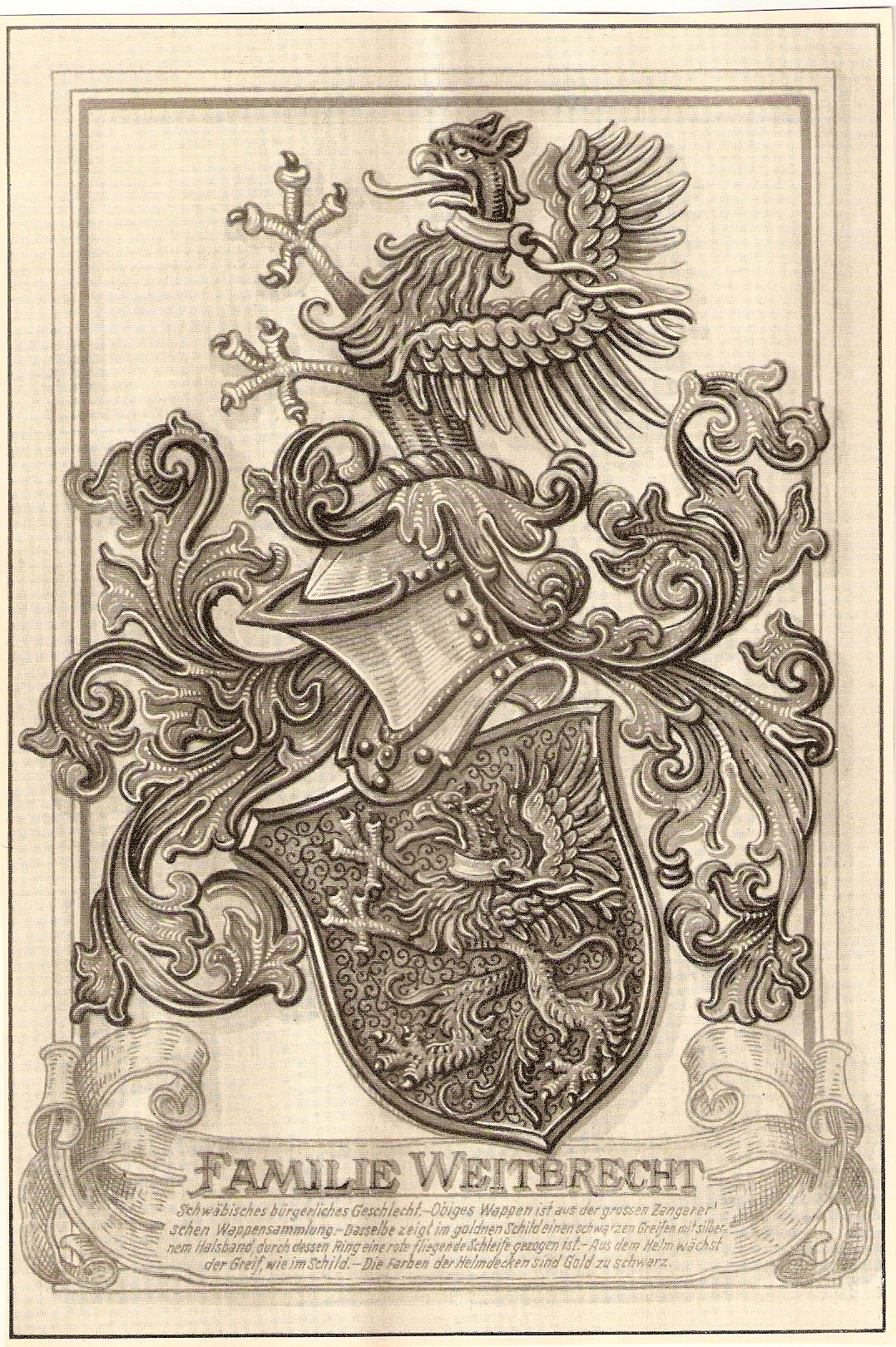 Wappendarstellung